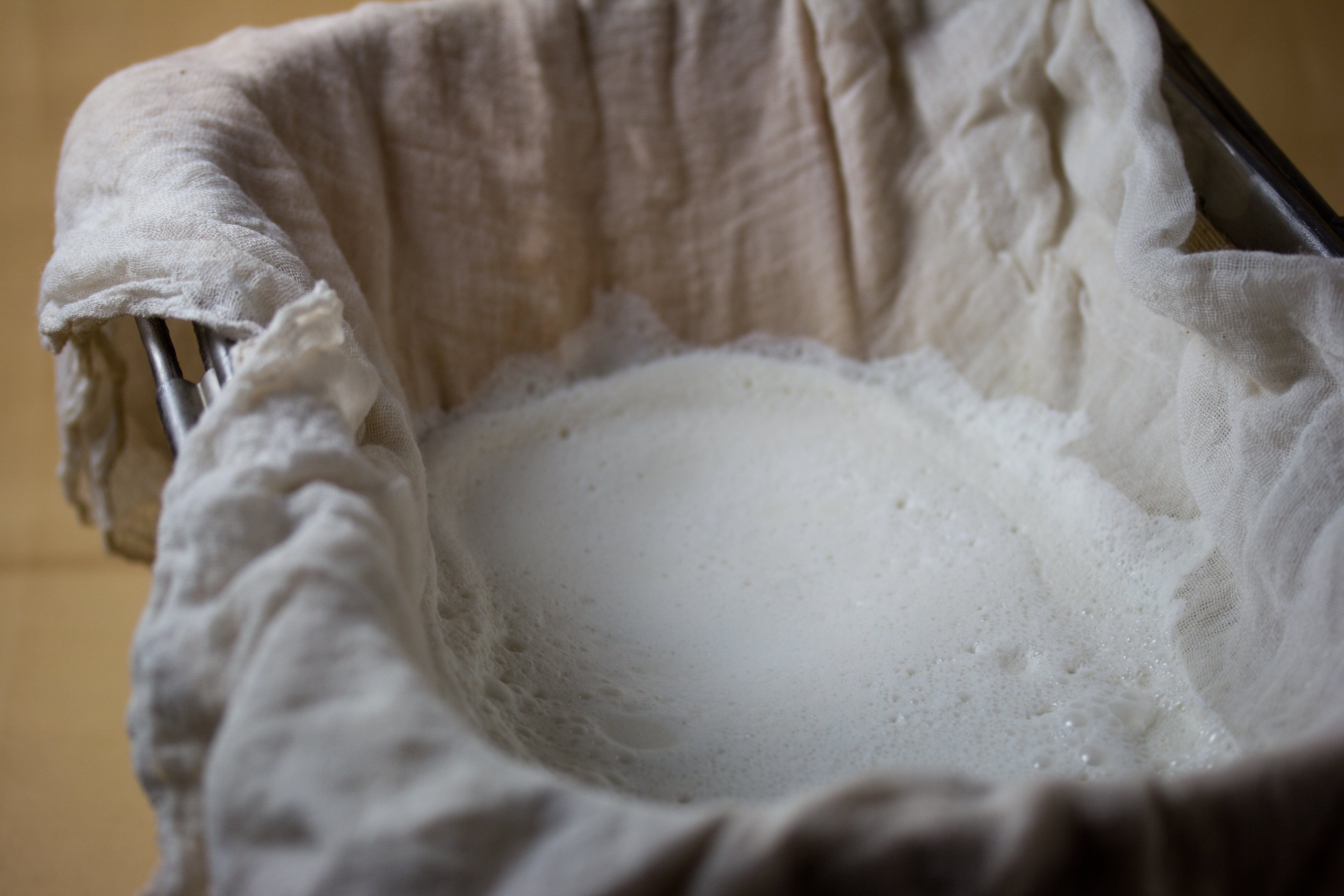 Nut Milk